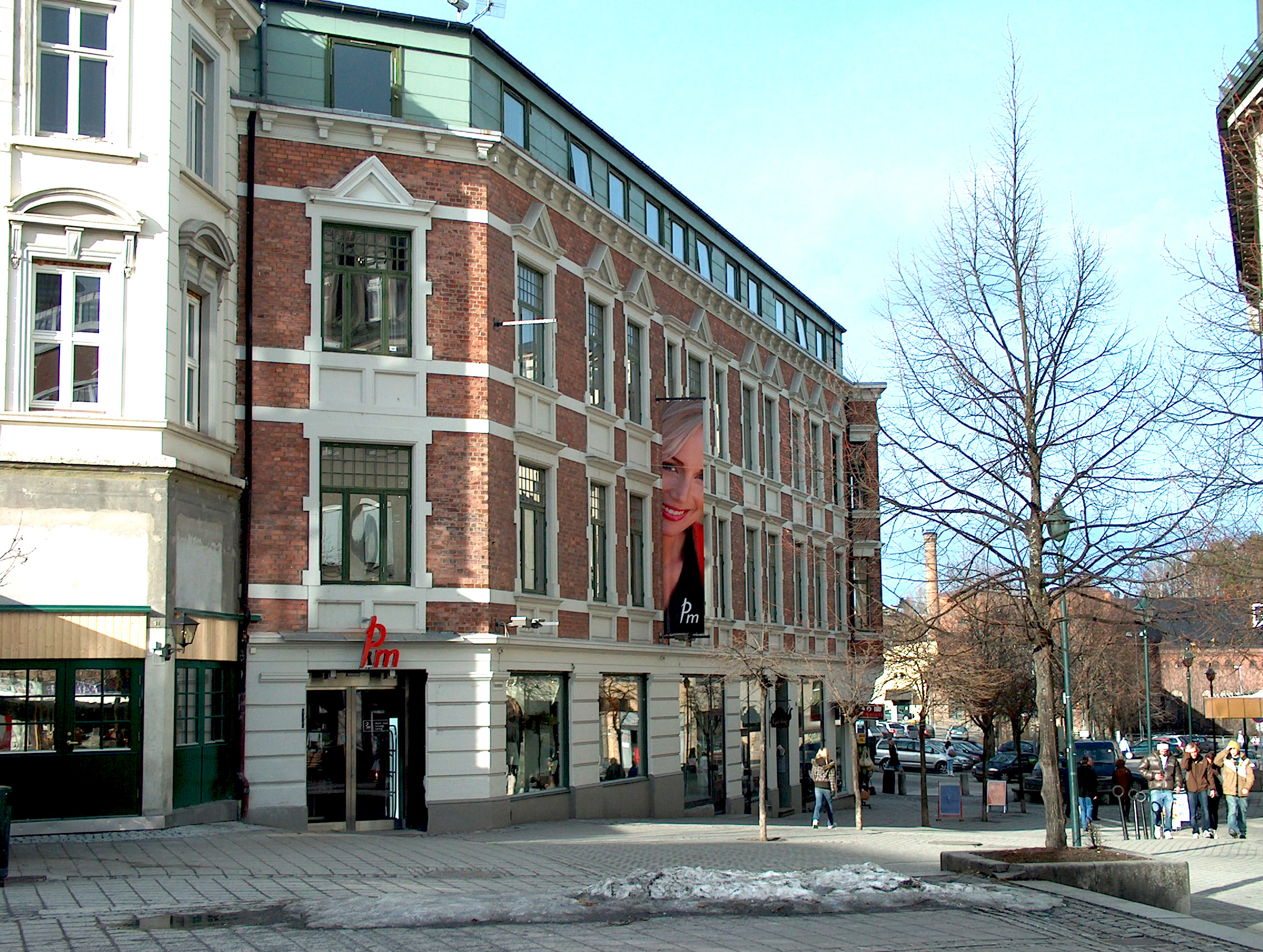 Thistedgården i Hønefoss (Fossveien 1)